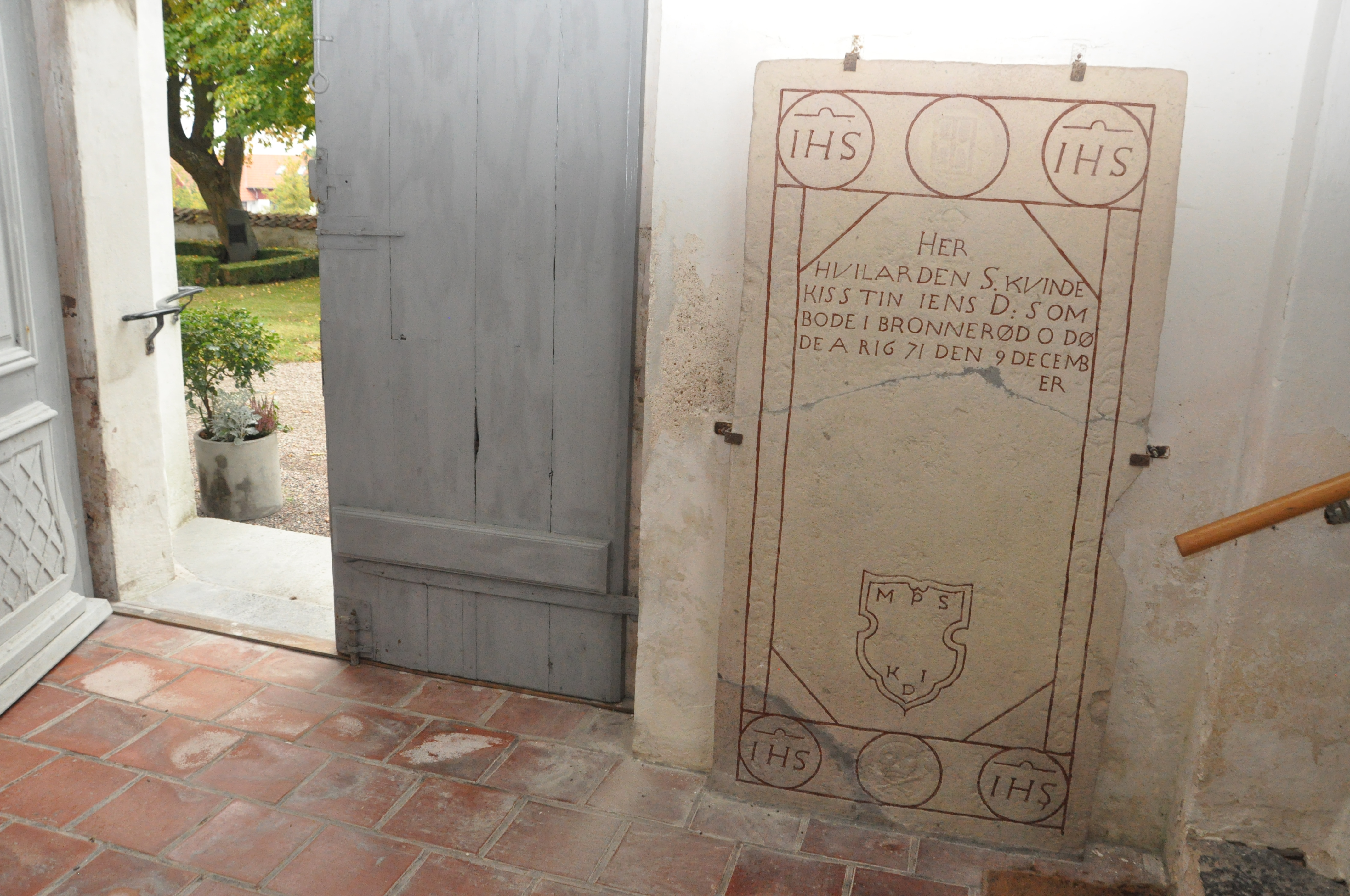 Den stora gravstenen (1671) från Lemmeströ gamla kyrka, numera stående i vapenhuset i Börringe kyrka.